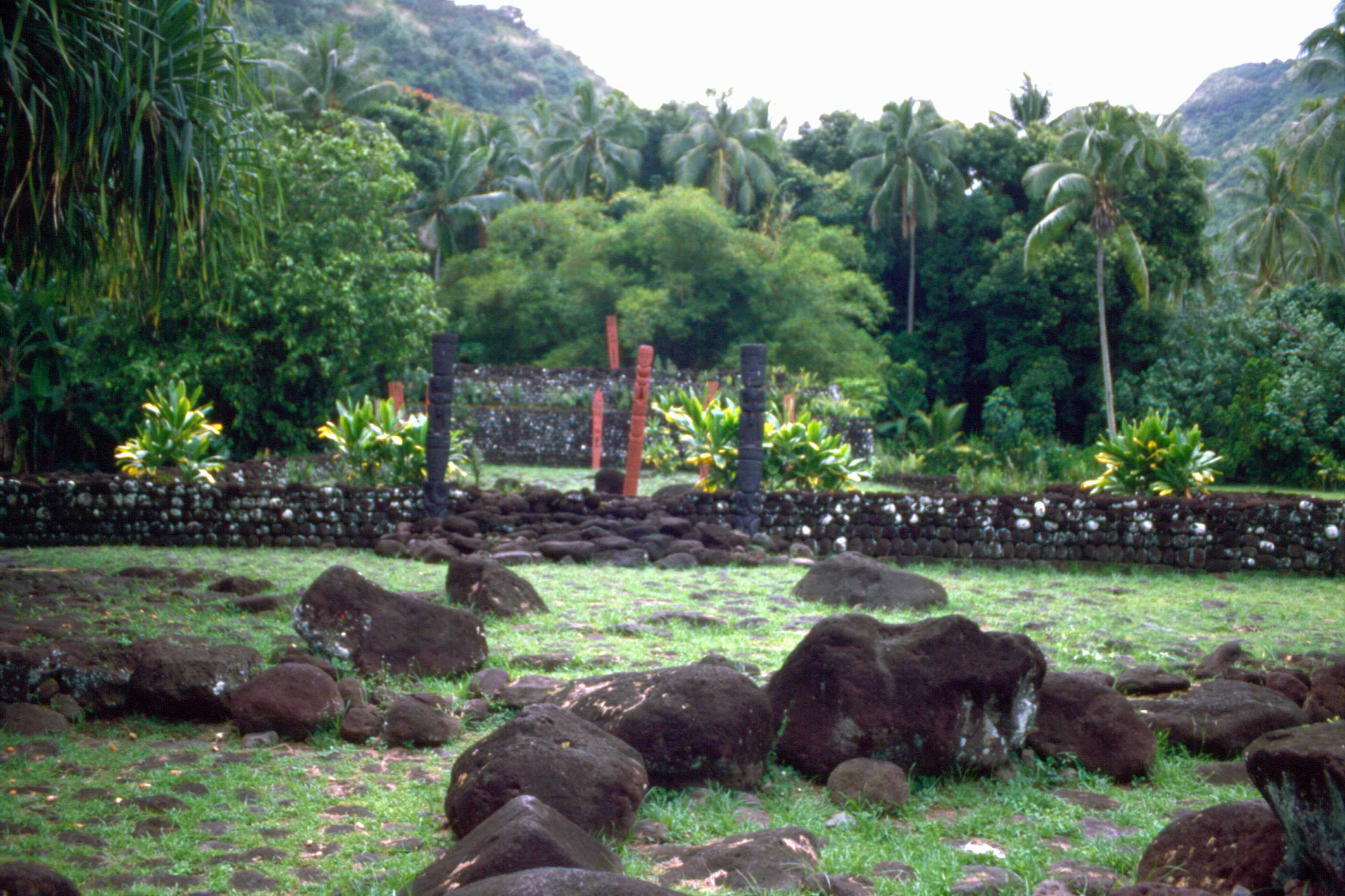 Marae im Arahurahu-Tal auf Tahiti, Französisch-Polynesien